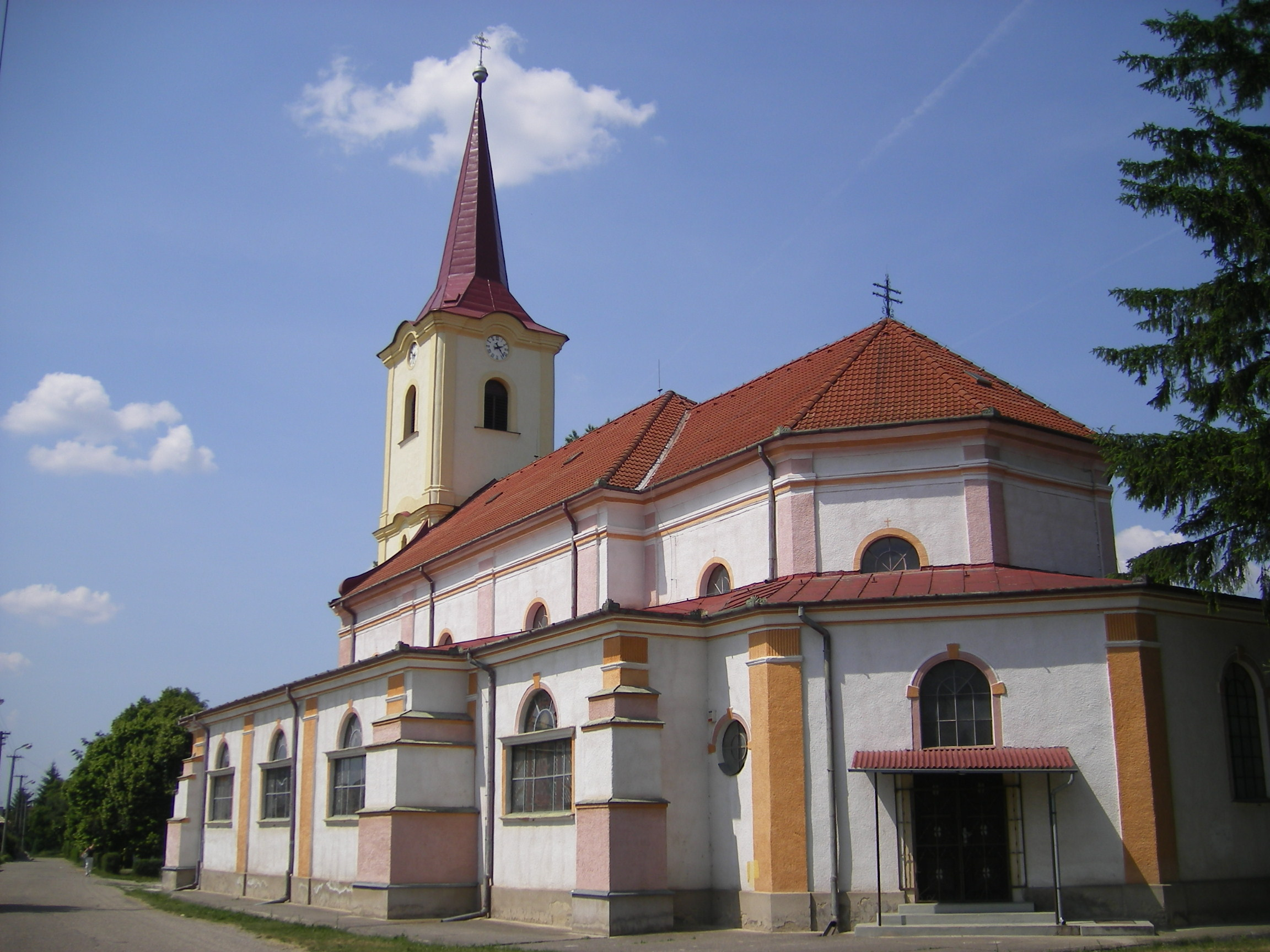 Kürt - katolikus templom